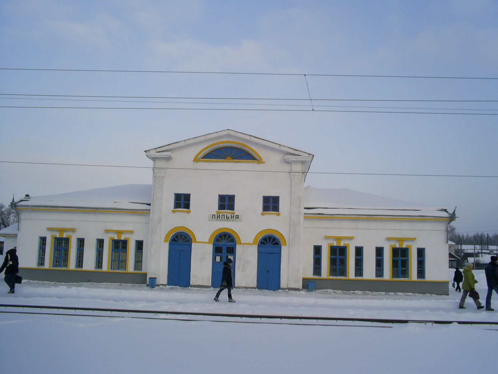 Железнодорожный вокзал в Пильне (Нижегородская область, Россия).